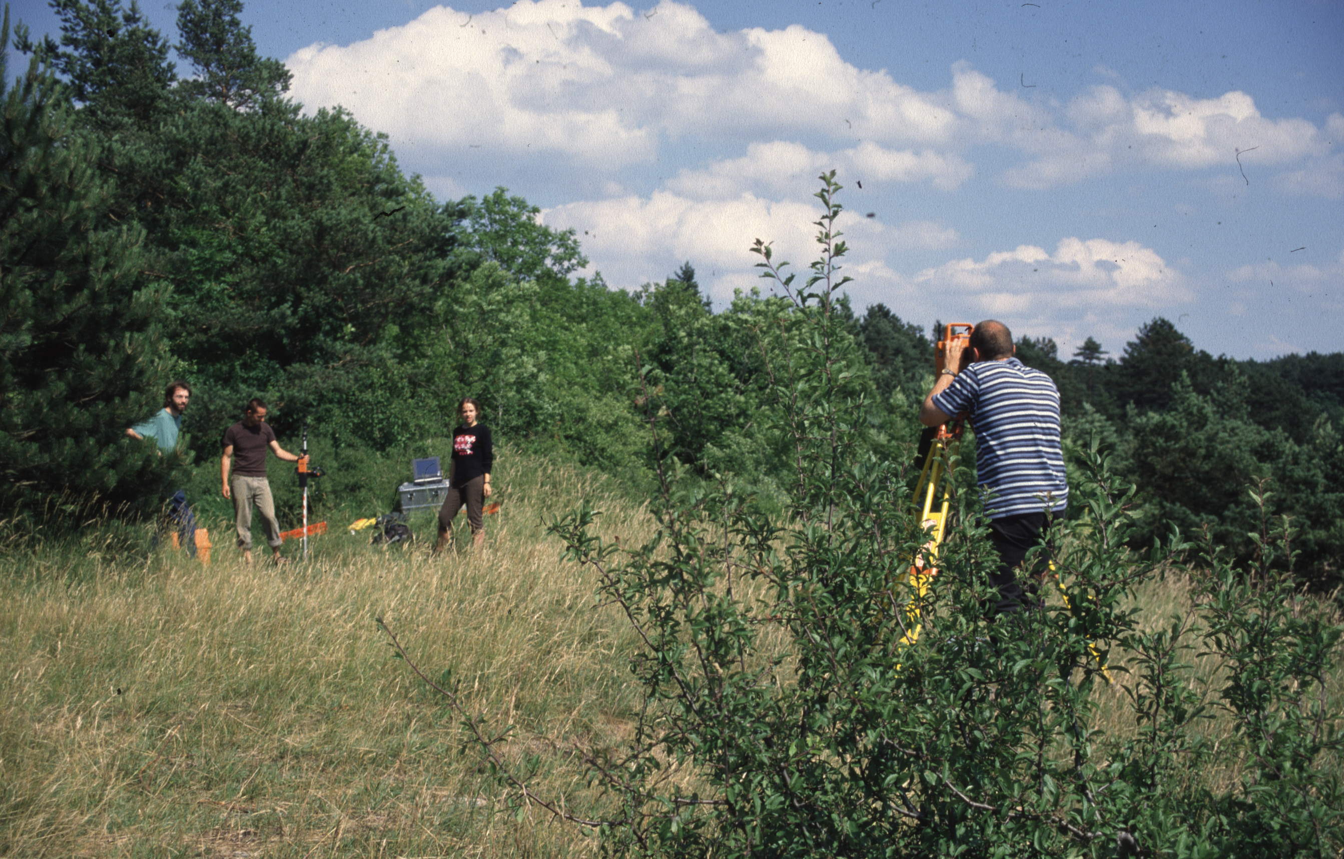 Jena-Lobeda, Johannisberg. Geophysikalische Untersuchungen und Vermessungen im Sommer 2003.